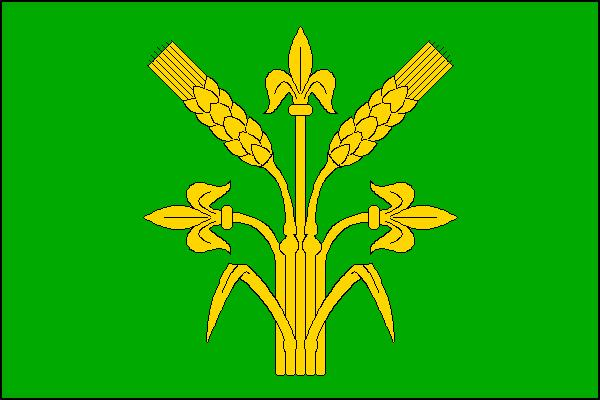 Vlajka obce Chotěšov (okres Litoměřice)